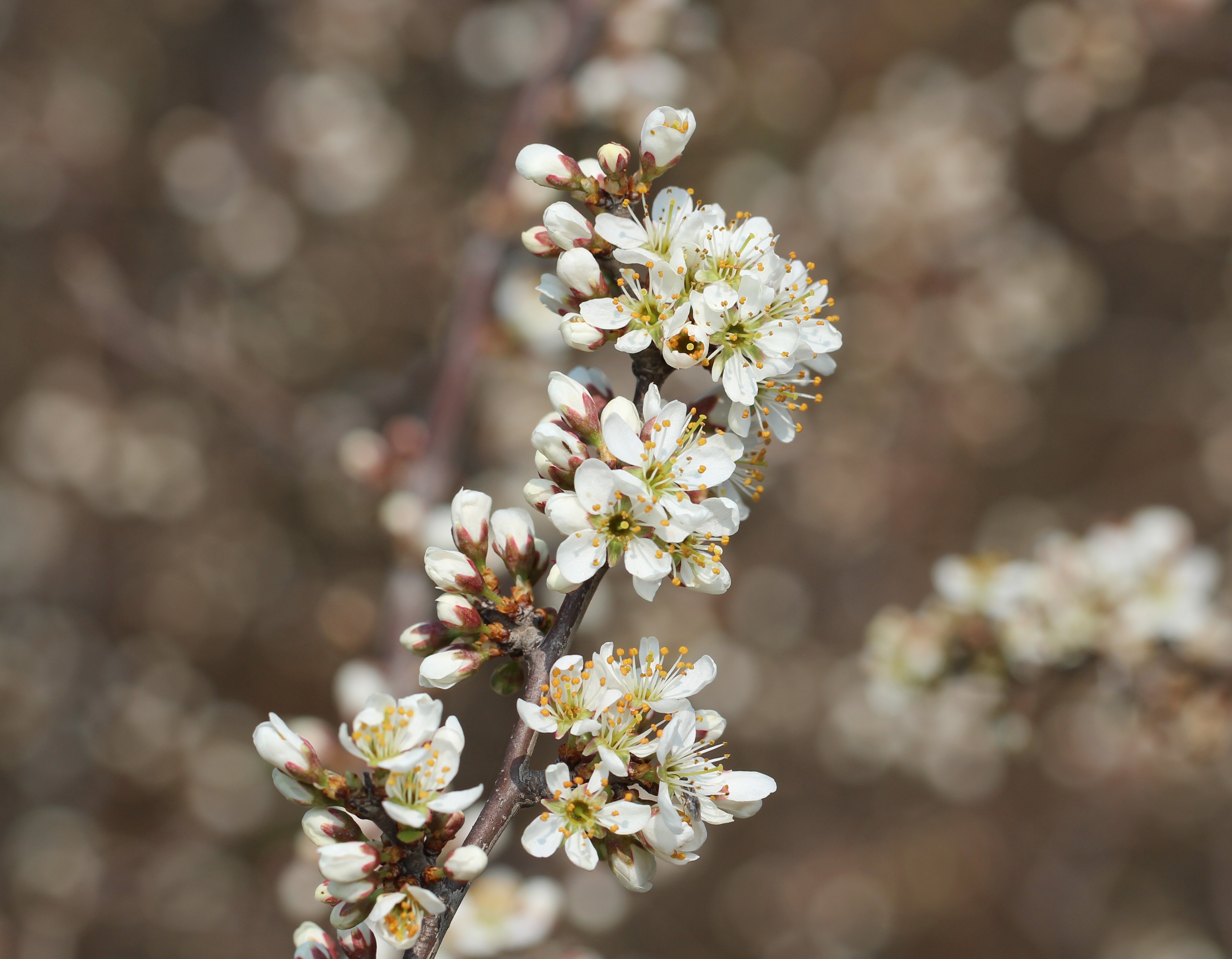 Schlehenblüte - verschiedene Stadien Anfang April in der Eifel